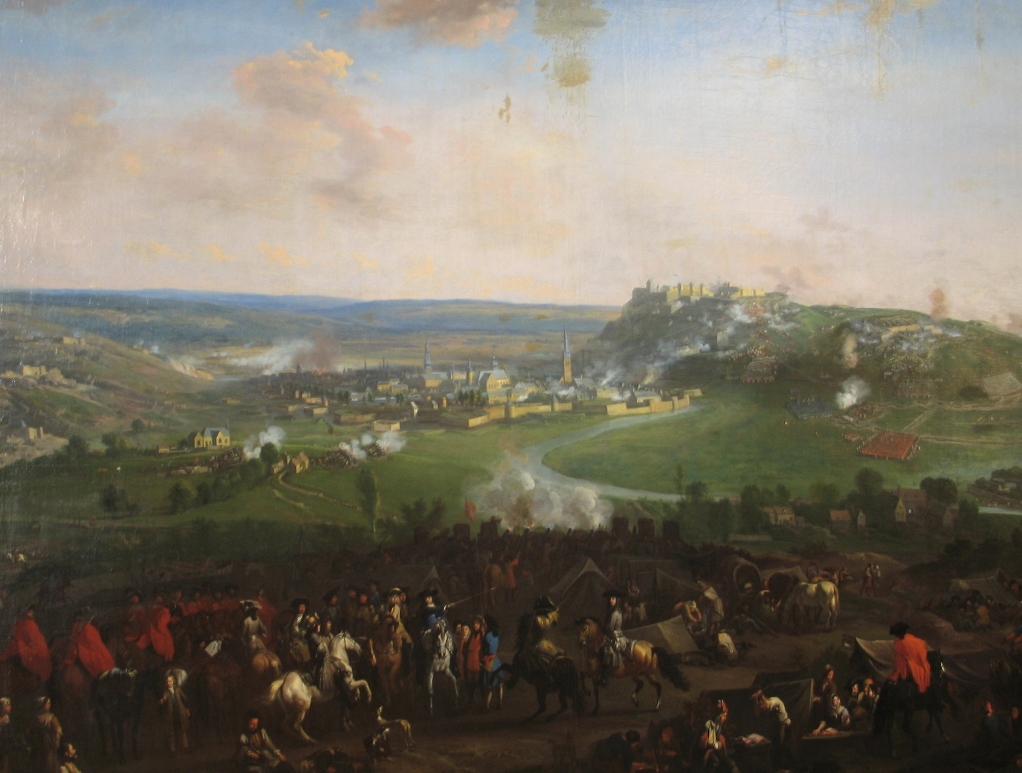 Die Belagerung der von den Franzosen verteidigten Festung Namur durch die Alliierten unter dem Oberbefehl von König Wilhelm III. von England im Juli und August 1695